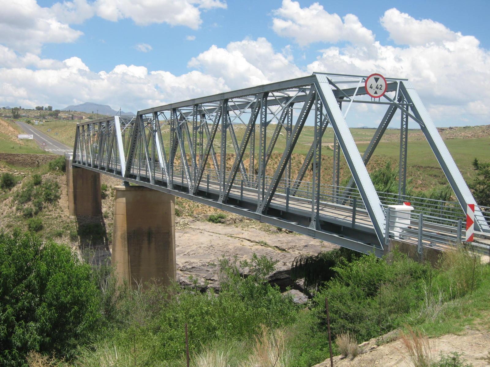 Bridge over Orange River near Sterkspruit